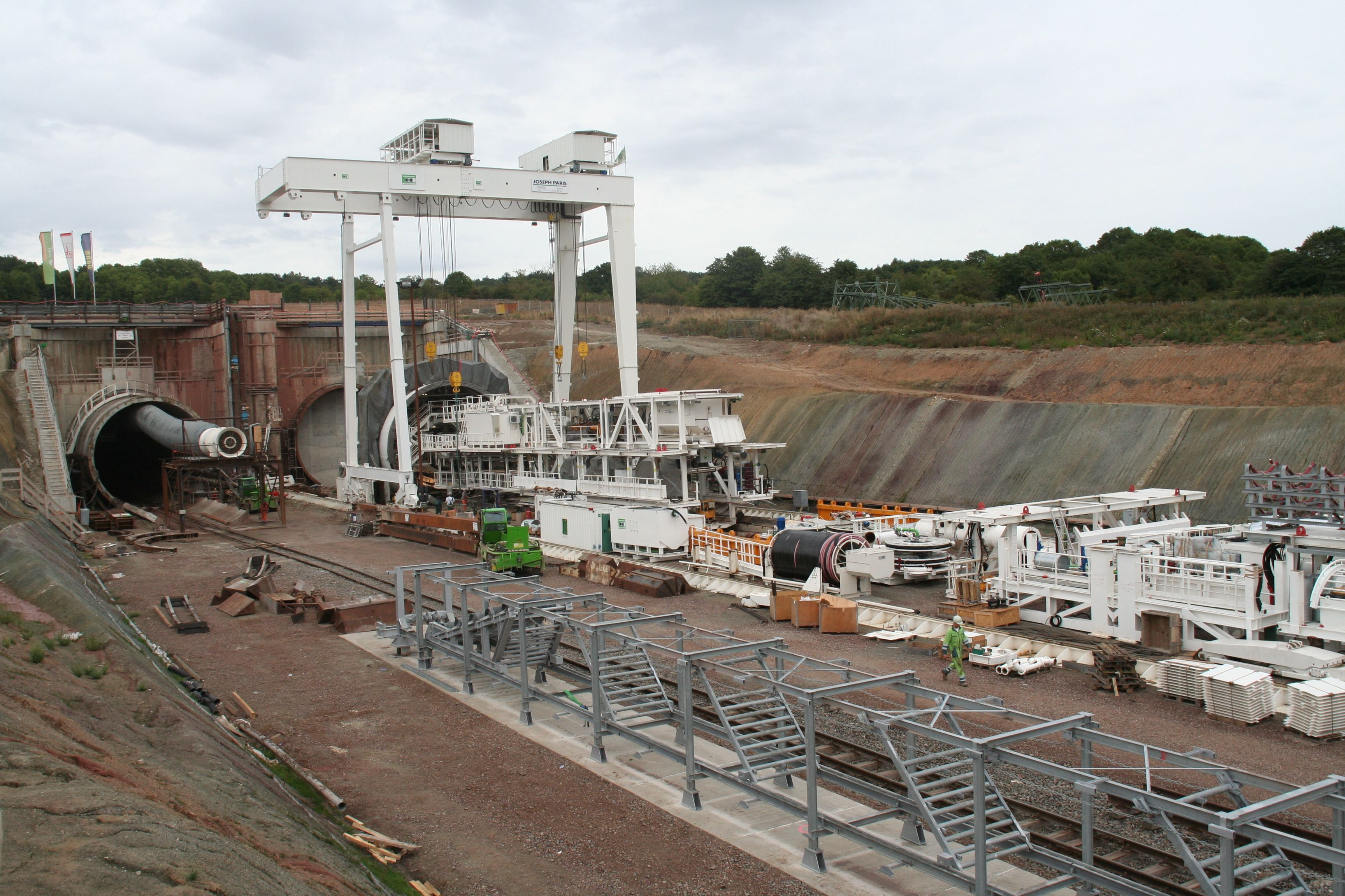 Finnetunnel, Tübbinglagerplatz